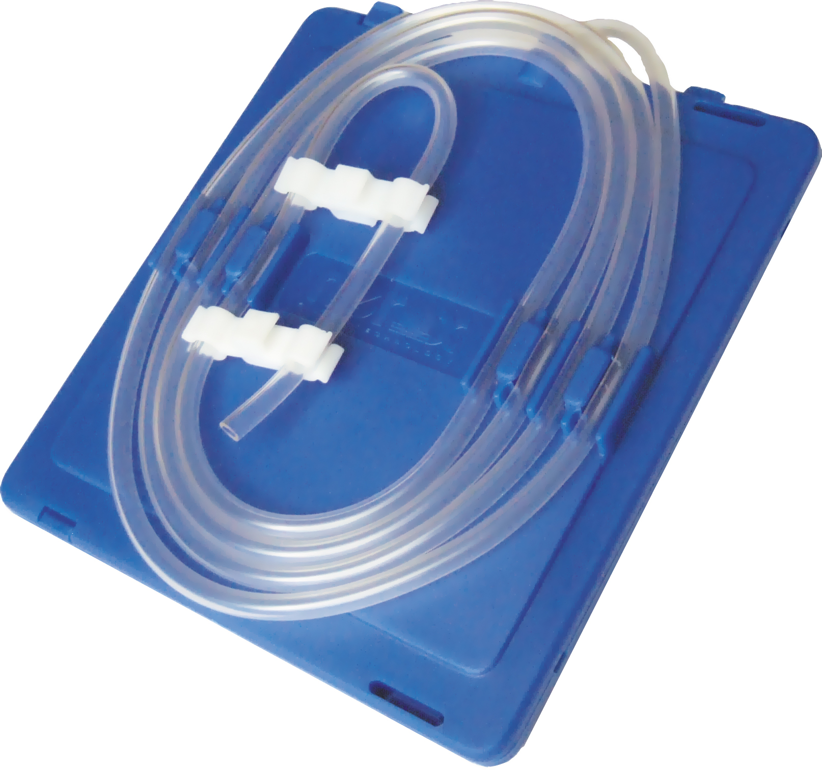 Фильтр NEROX